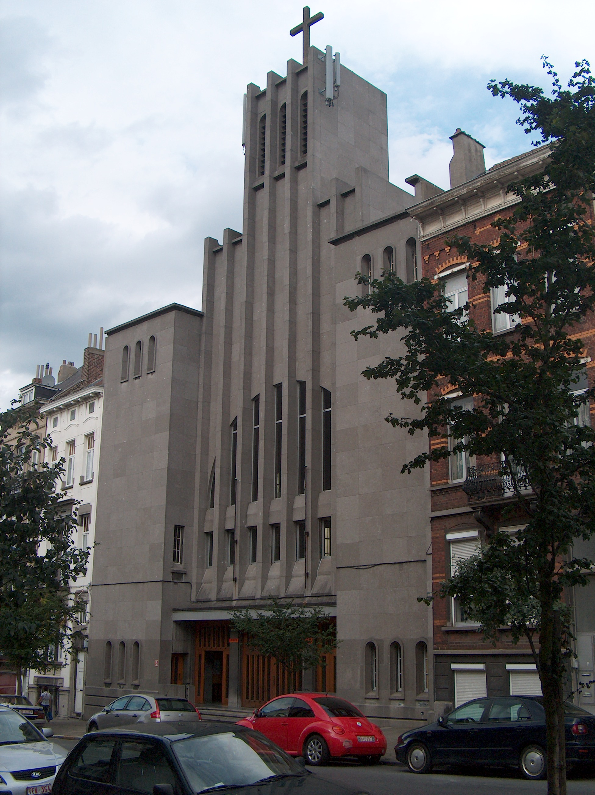 L'église Sainte-Alice, avenue Dailly à Schaerbeek, Bruxelles, Belgique.